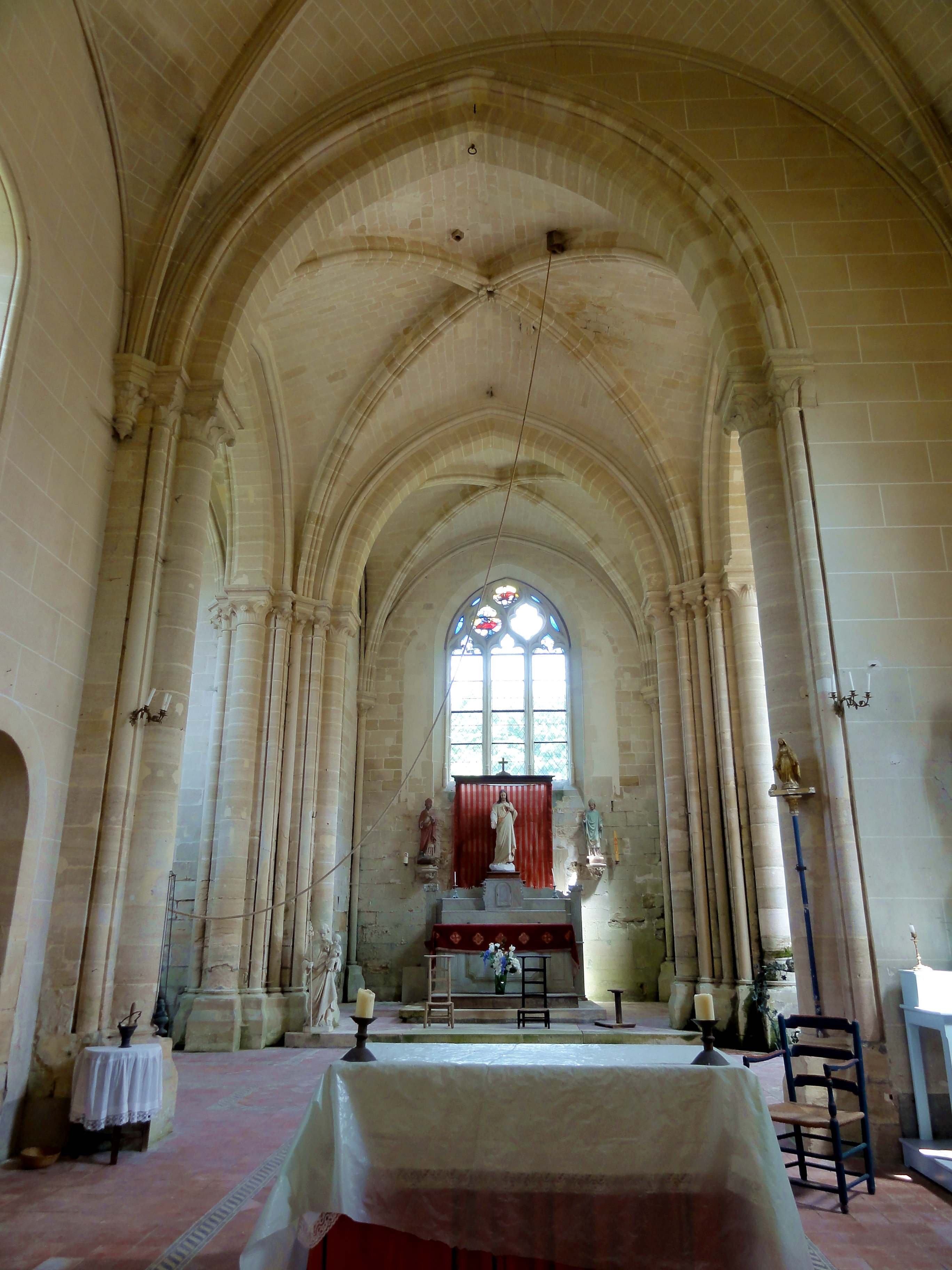 Intérieur de l'église Saint-Lucien d'Ansacq (voir titre).